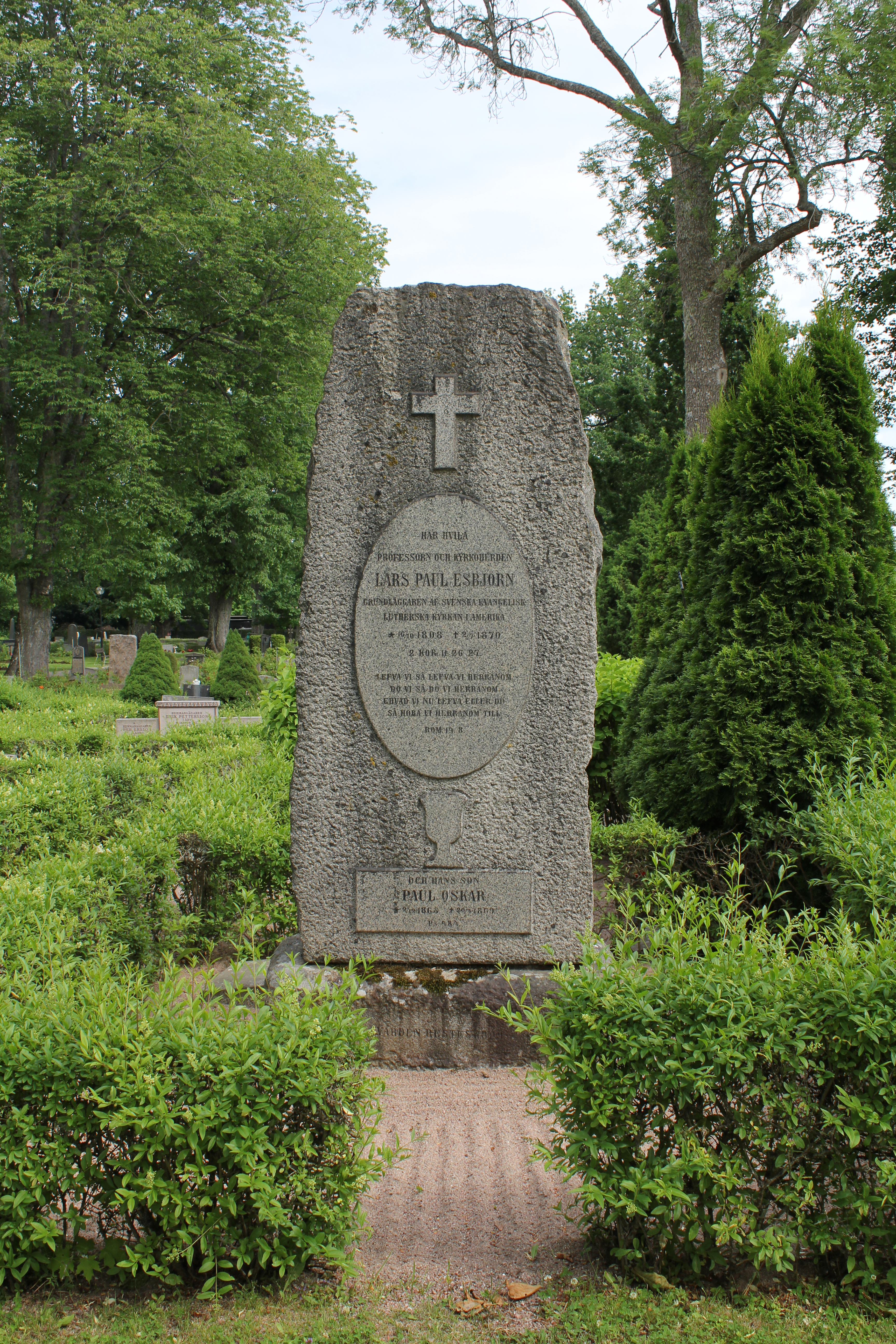 Lars Paul Esbjörns grav vid Östervåla kyrka i Heby kommun.